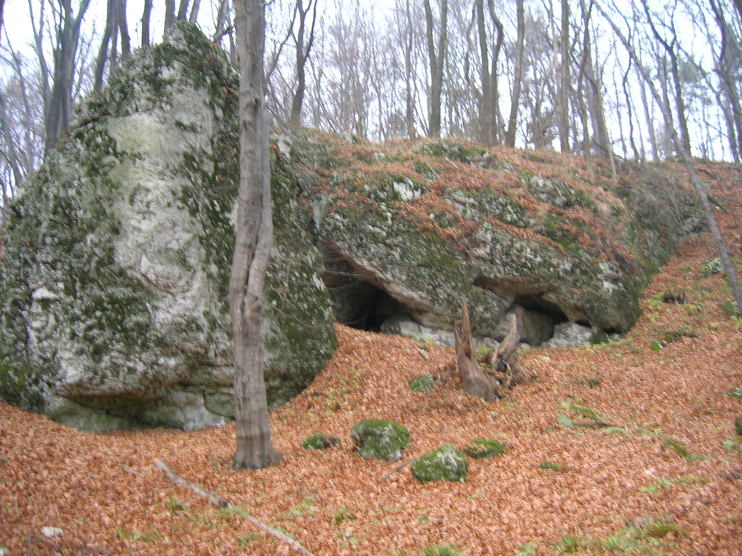 Jaskinia Gorenicka.Widok